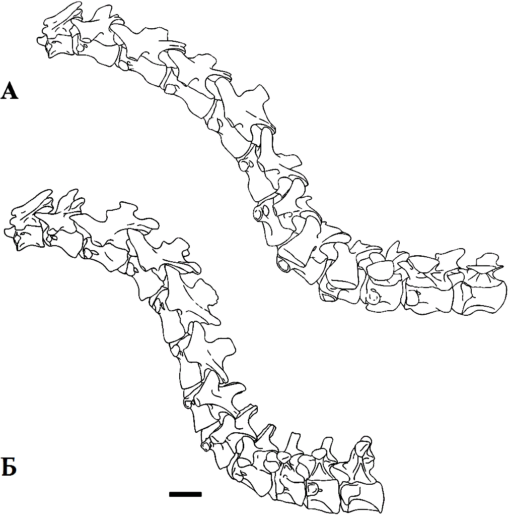 Реконструкции шеи Sigilmassasaurus и барионикса (Baryonyx). (А) Sigilmassasaurus; (Б) Барионикс (Baryonyx). Шкала равна 10 см. Шкала применительна только к бариониксу, поскольку известен неизвестен ассоциированный материал Sigilmassasaurus.